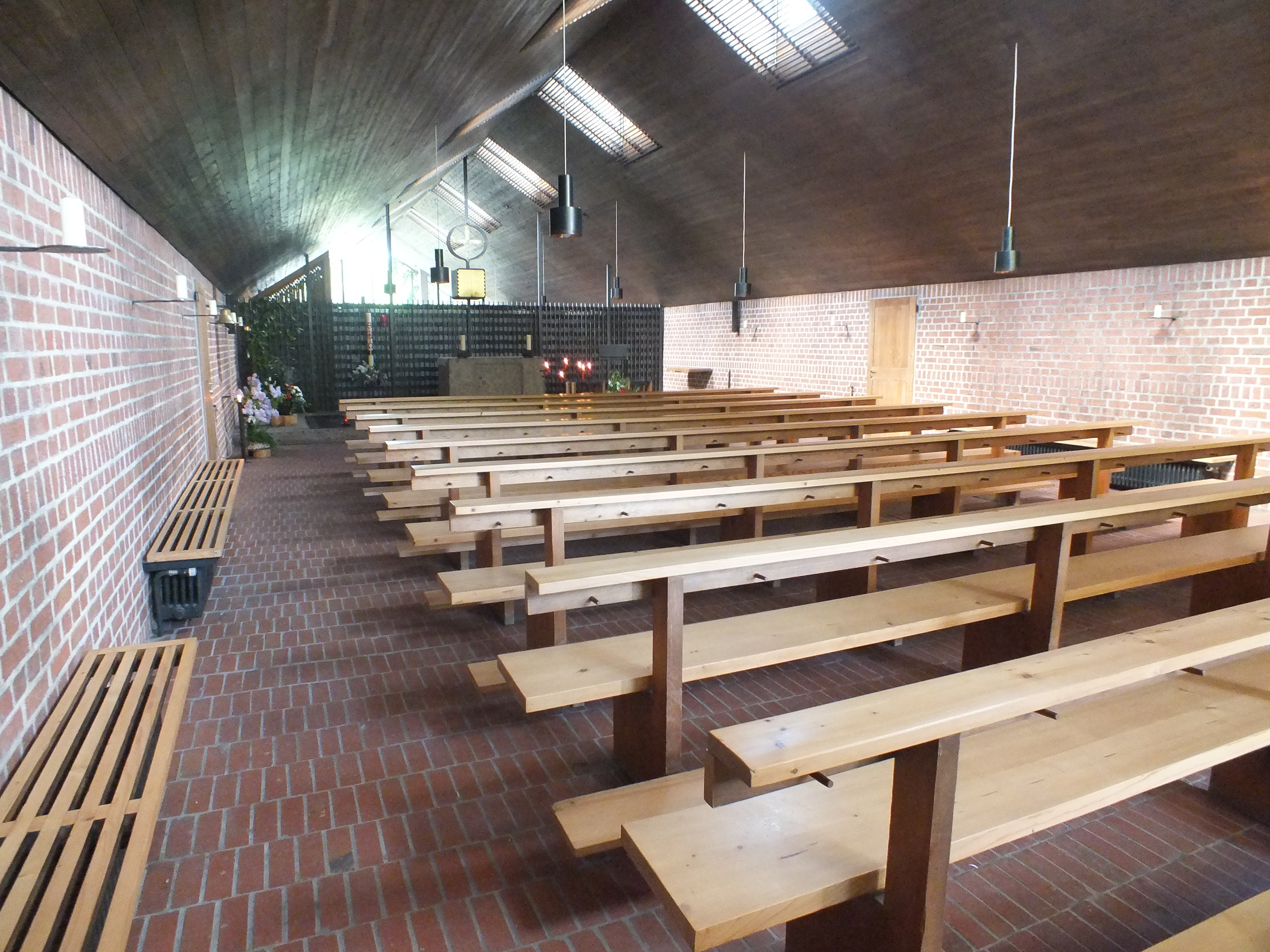 KZ-Gedenkstätte Dachau: Karmel Heilig Blut